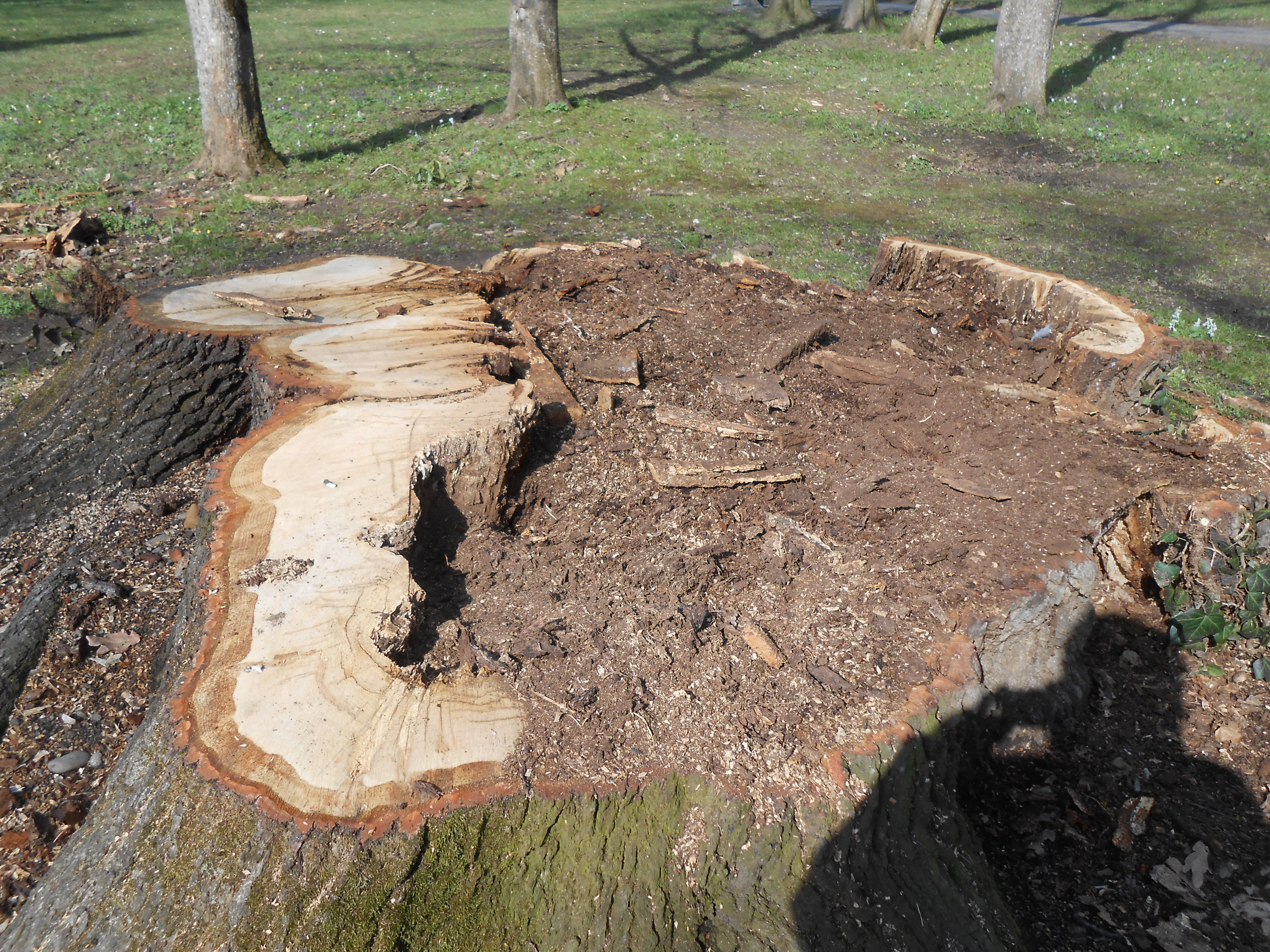 Jeseni 2014 je padel eden od stoletnih hrastov.